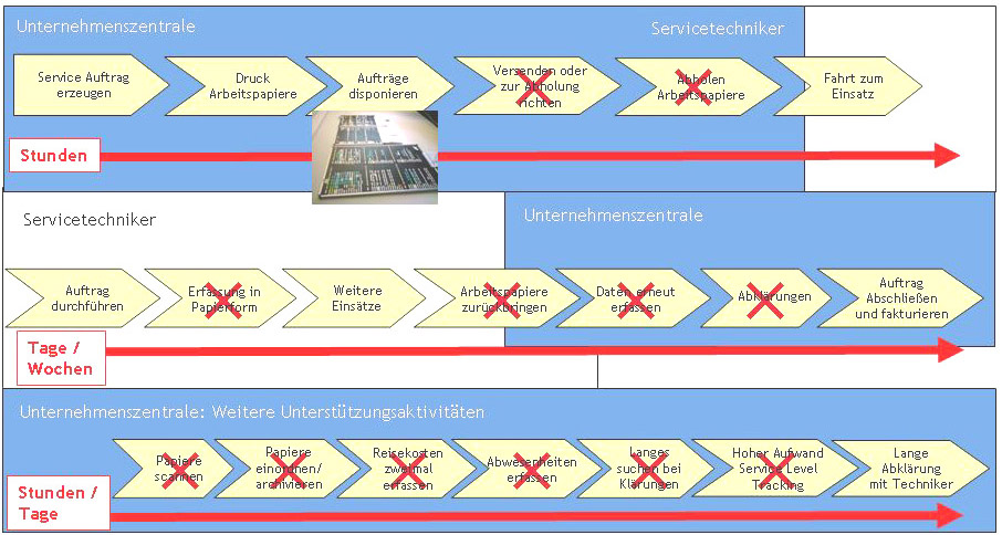 Mit Hilfe von Tools für einen mobilen Kundendienst werden zahlreiche Prozessschritte sowohl in der Unternehmenszentrale als auch beim Servicetechniker eliminiert.